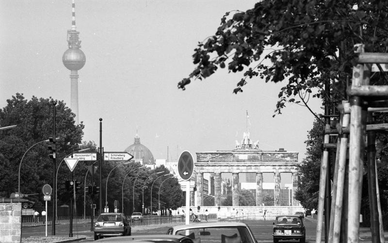 Juni 1988 Berlin (West) Brandenburger Tor